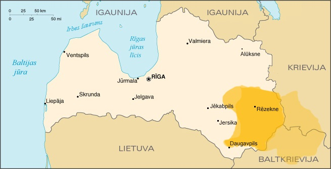 Lotigolas (Lotygolas) valsts (novada) teritorijas variācijas pēc dažādām vēstures kartēm.